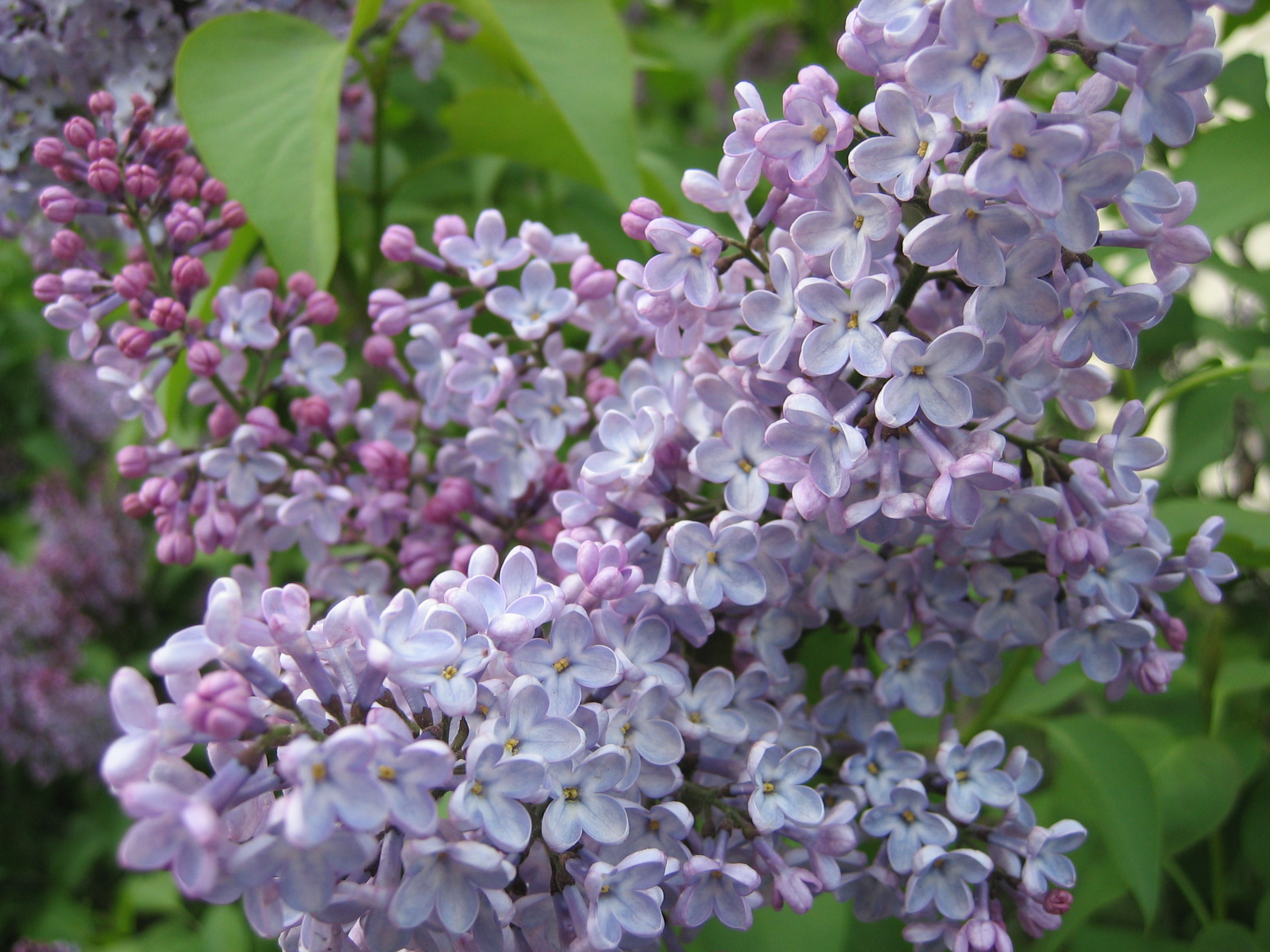 lilac Syringa vulgaris in bloomIMG_2284